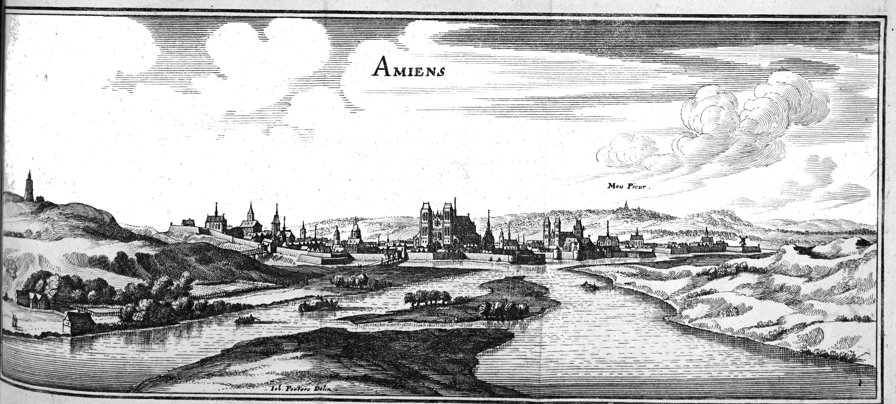 extrait de "TOpographia Galliae".